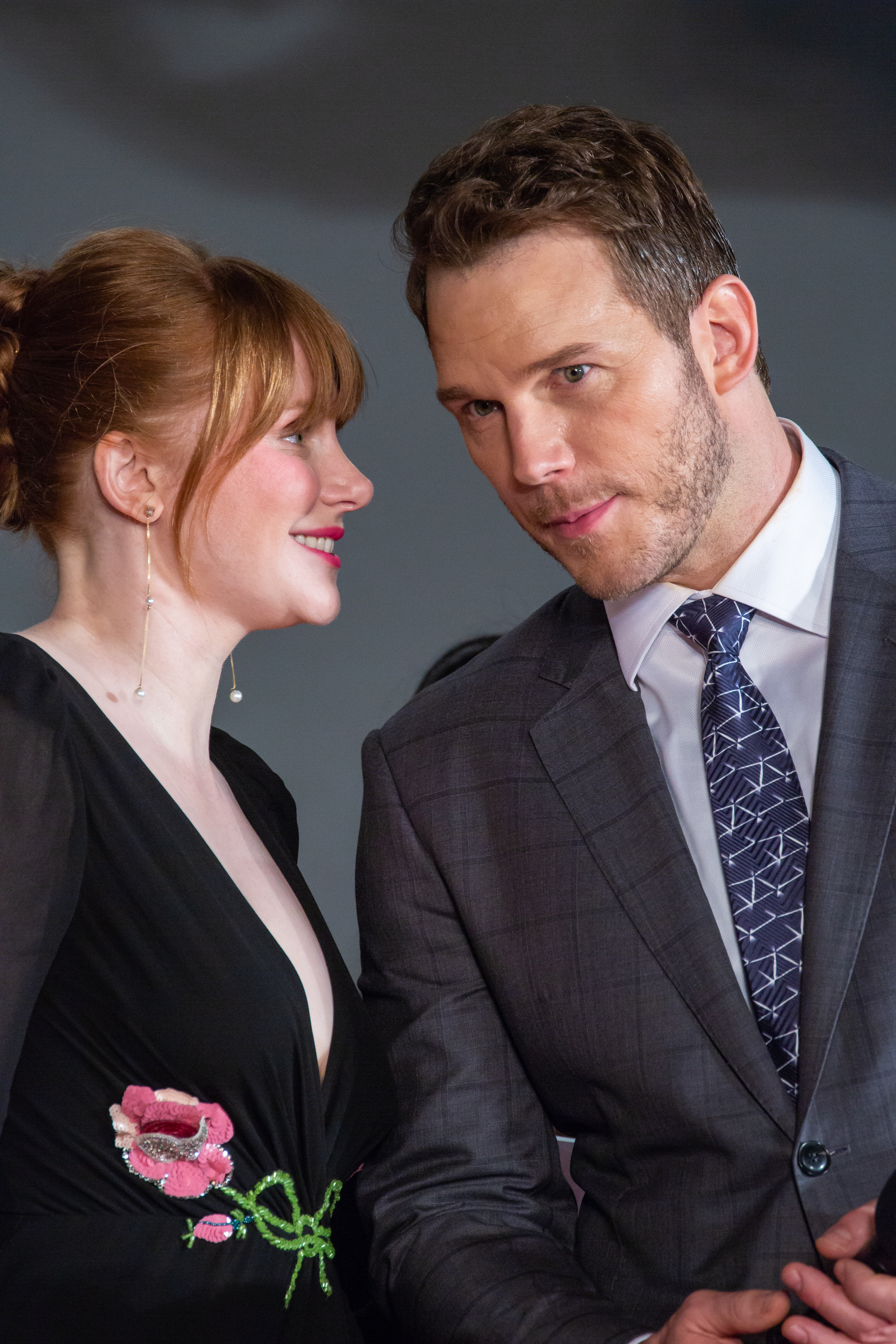 ジュラシック・ワールド/炎の王国 ジャパン・プレミア レッドカーペット クリス・プラット ブライス・ダラス・ハワード